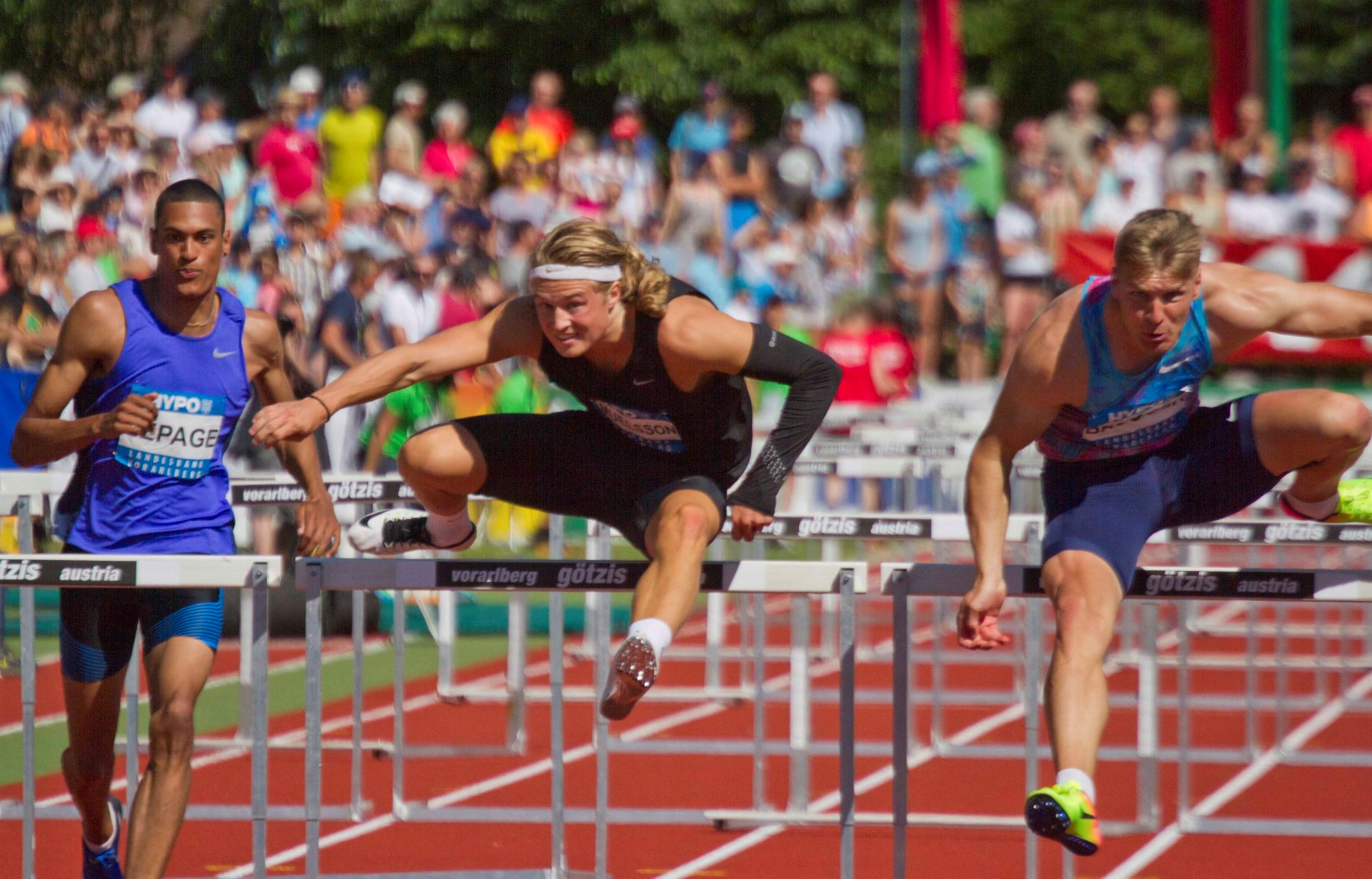 248 samuelsson 110mH